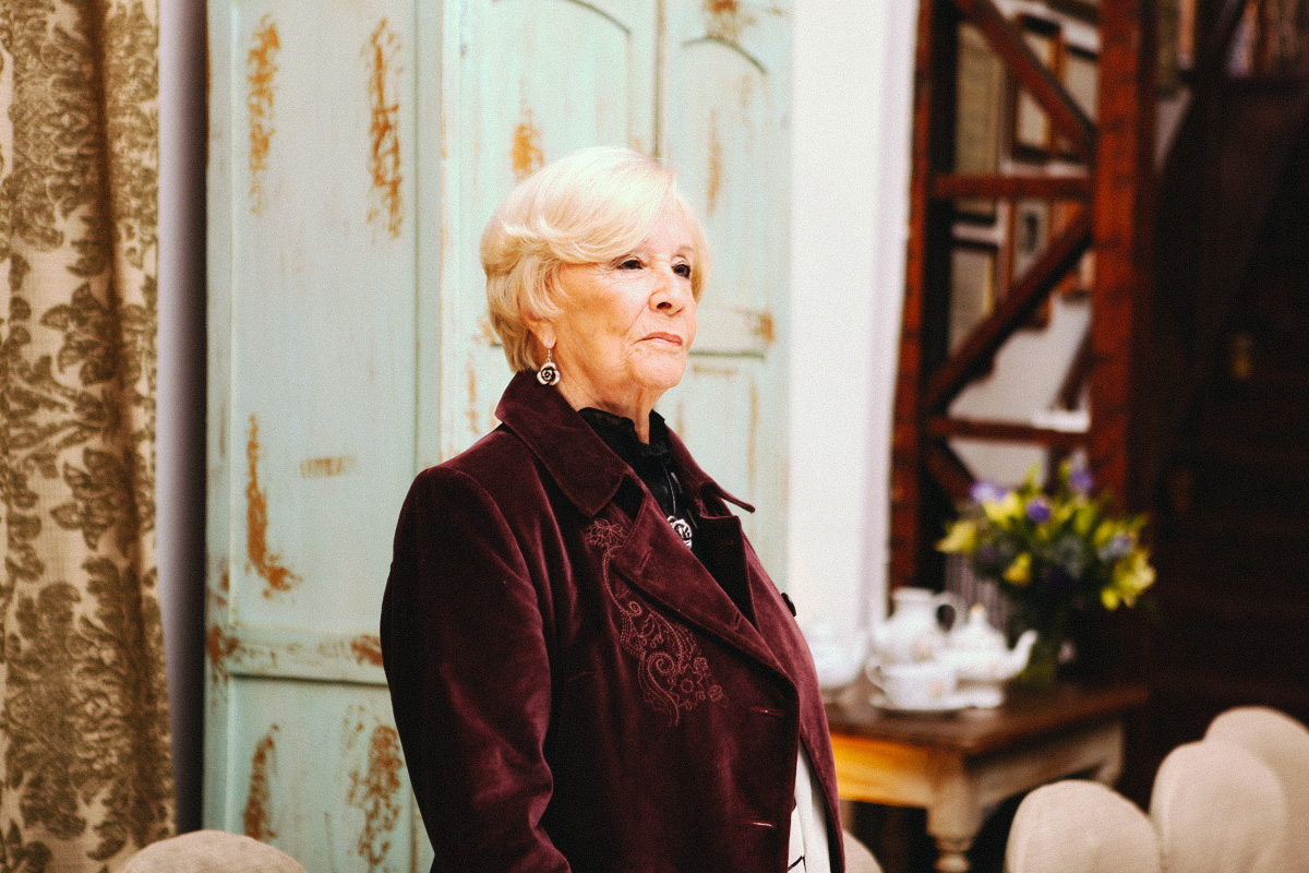 Delfina Guzmán Correa (Santiago, 7 de abril de 1928) es una destacada primera actriz, guionista y directora teatral chilena. Actualmente es presidenta de Fundación Teatro a Mil.